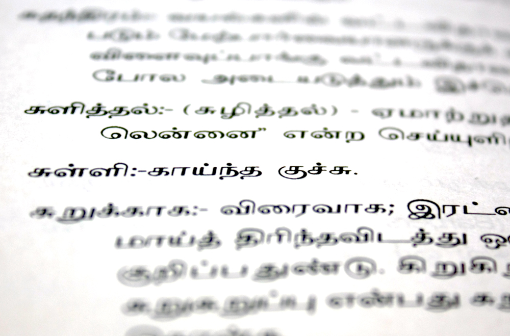 மட்டக்களப்புத் தமிழகம் கூறும் மட்டக்களப்புத் தமிழ்ச் சொற்கள்